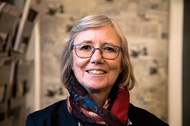 portrait de Laurence Fehlmann Rielle, fait par moi à Genève